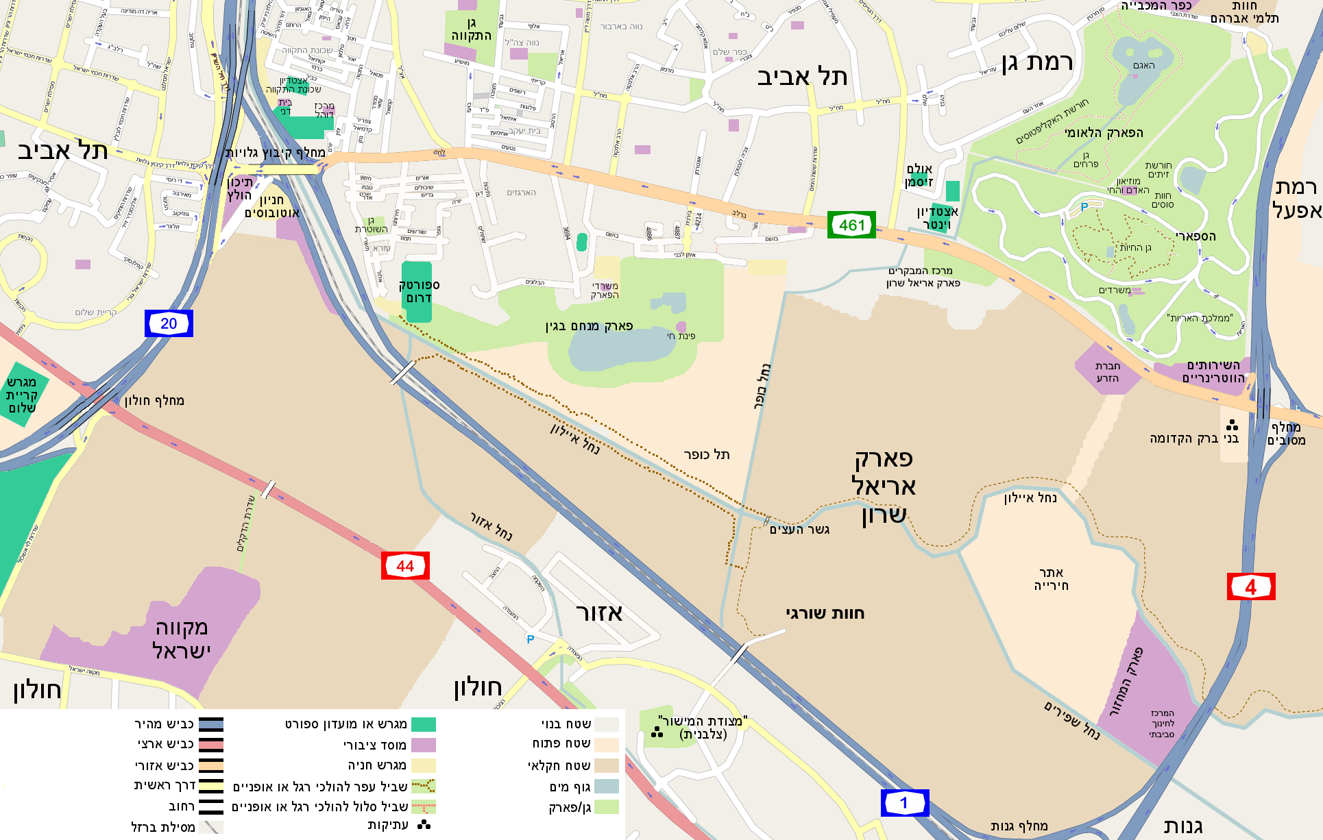 דרום תל אביב